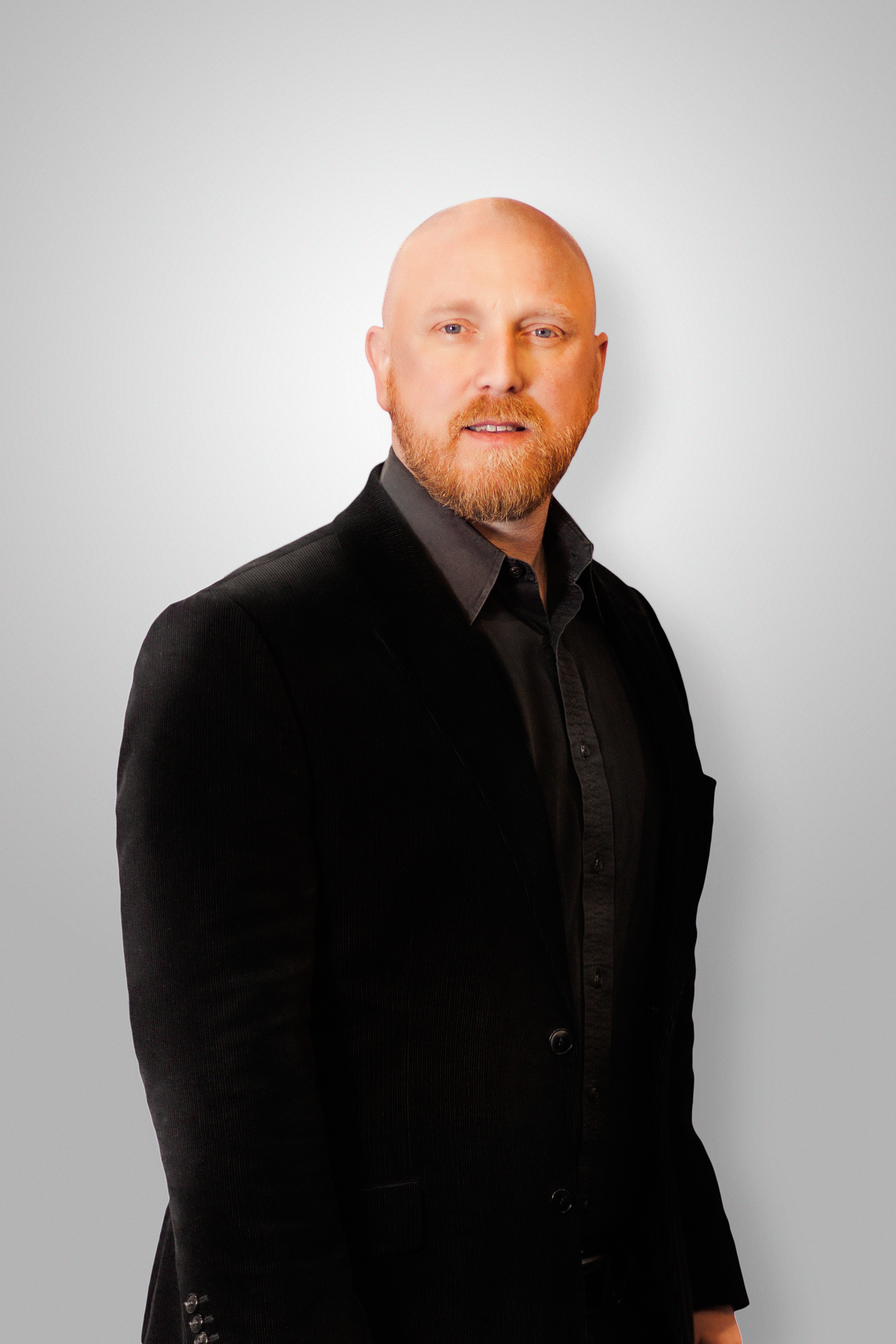 Stefan Hoff, Geschäftsführer nobeo GmbH